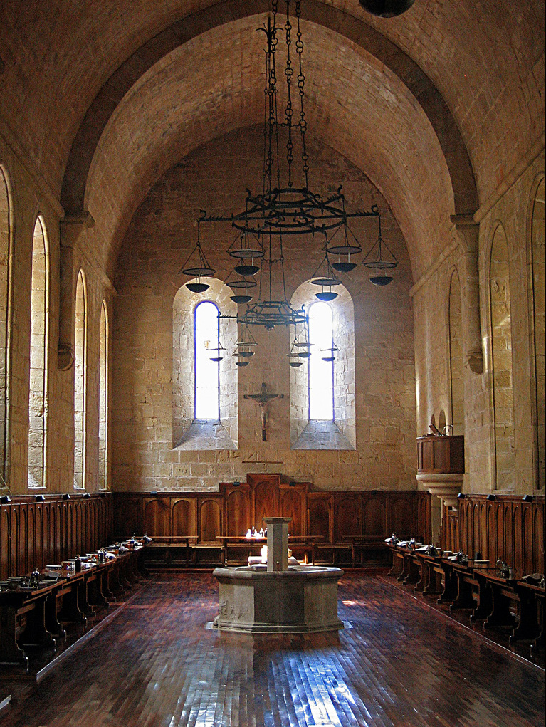 Foto desde el cristal de la puerta, ya que el paso esta vedado a los visitantes. Refectorio de los monjes (comedor).